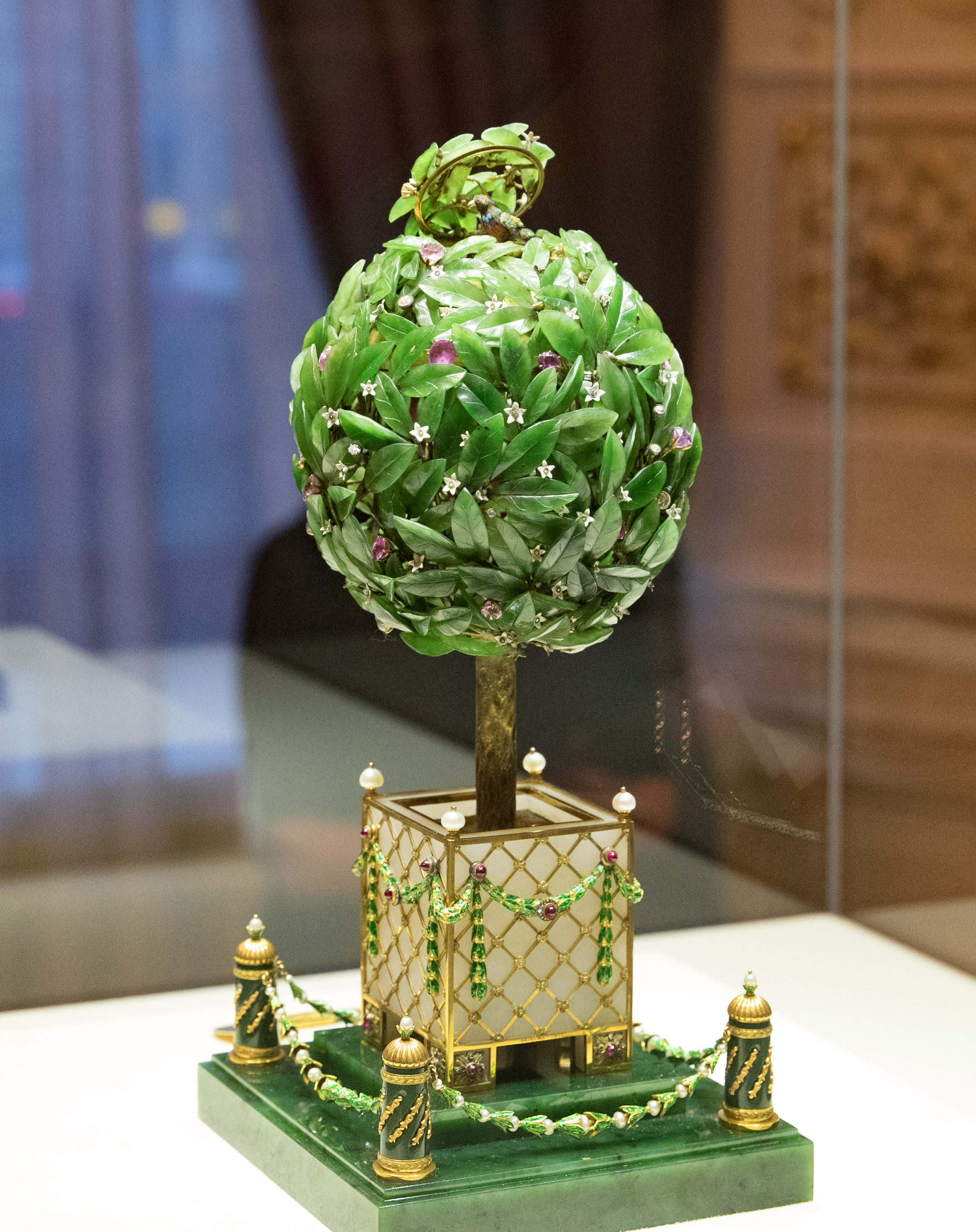 Fabergé Museum, Saint Petersburg, Russia